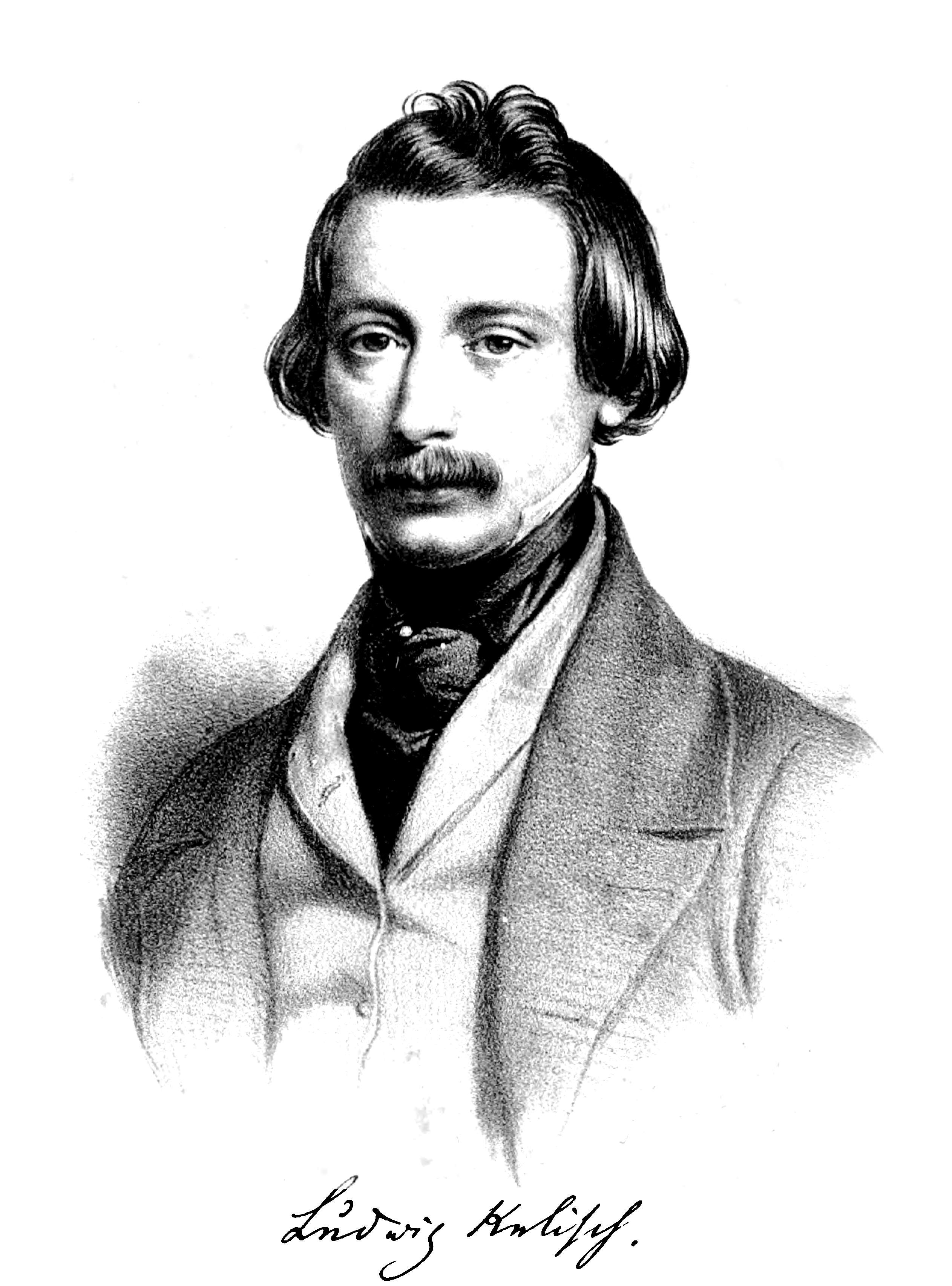 Portrait: Ludwig Kalisch. In: Schlagschatten. Humoristische Aufsätze. Neue Ausgabe mit einem Bildniß des Verfassers. Verlag von J. G. Wirth Sohn, Mainz 1851